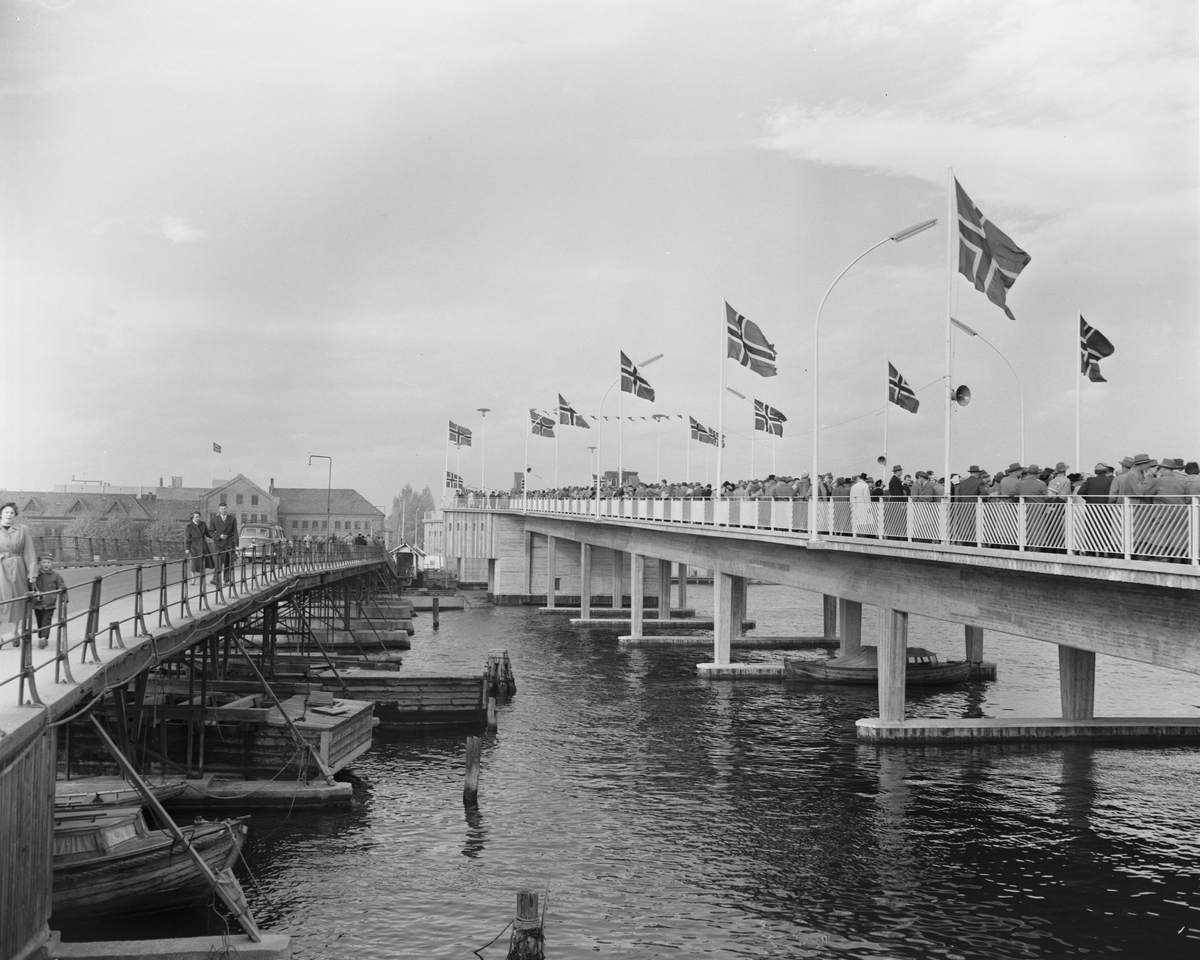 Broer